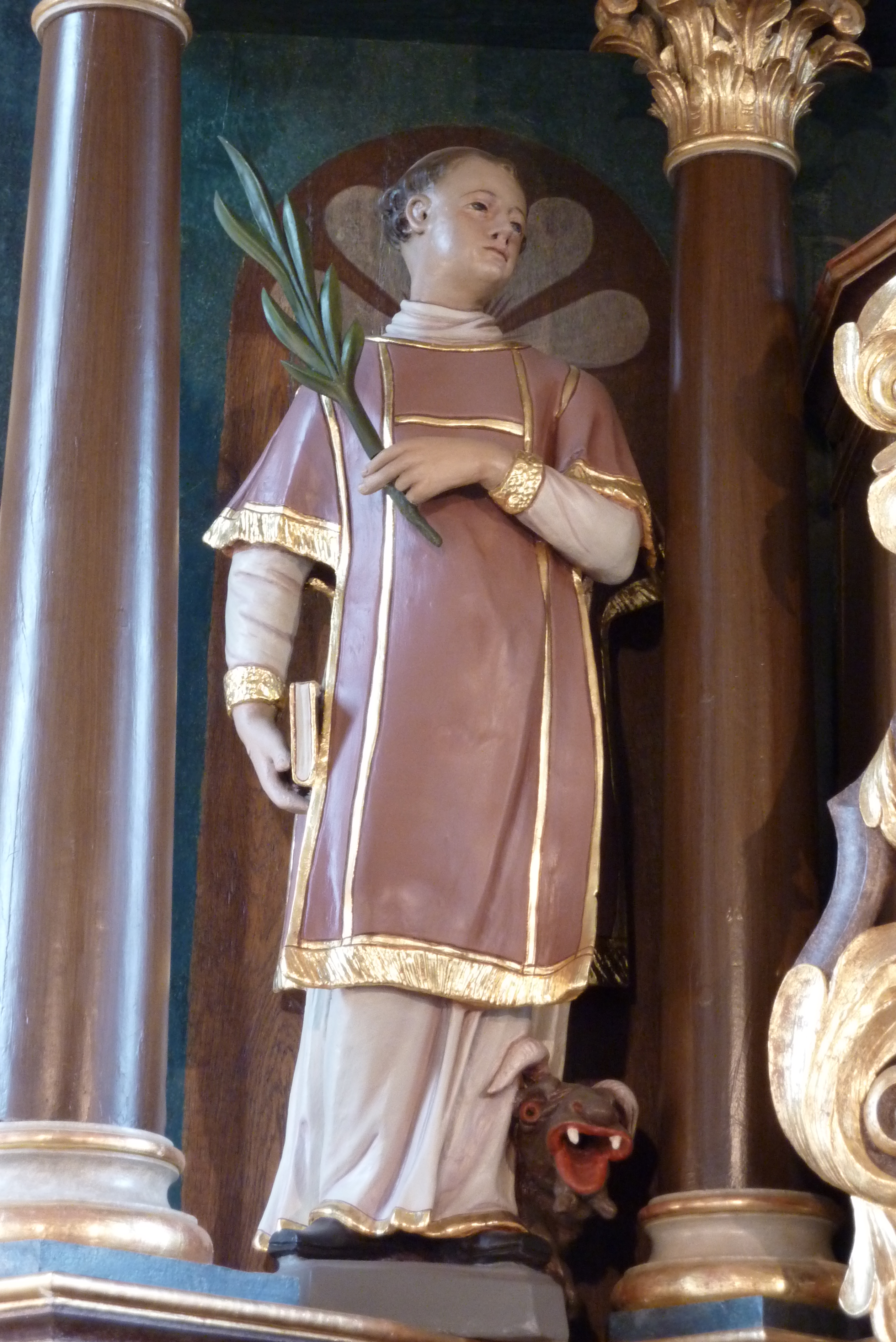 Katholische Kirche St. Cyriakus in Dümpelfeld, Skulptur des hl. Cyriakus im Hauptaltar